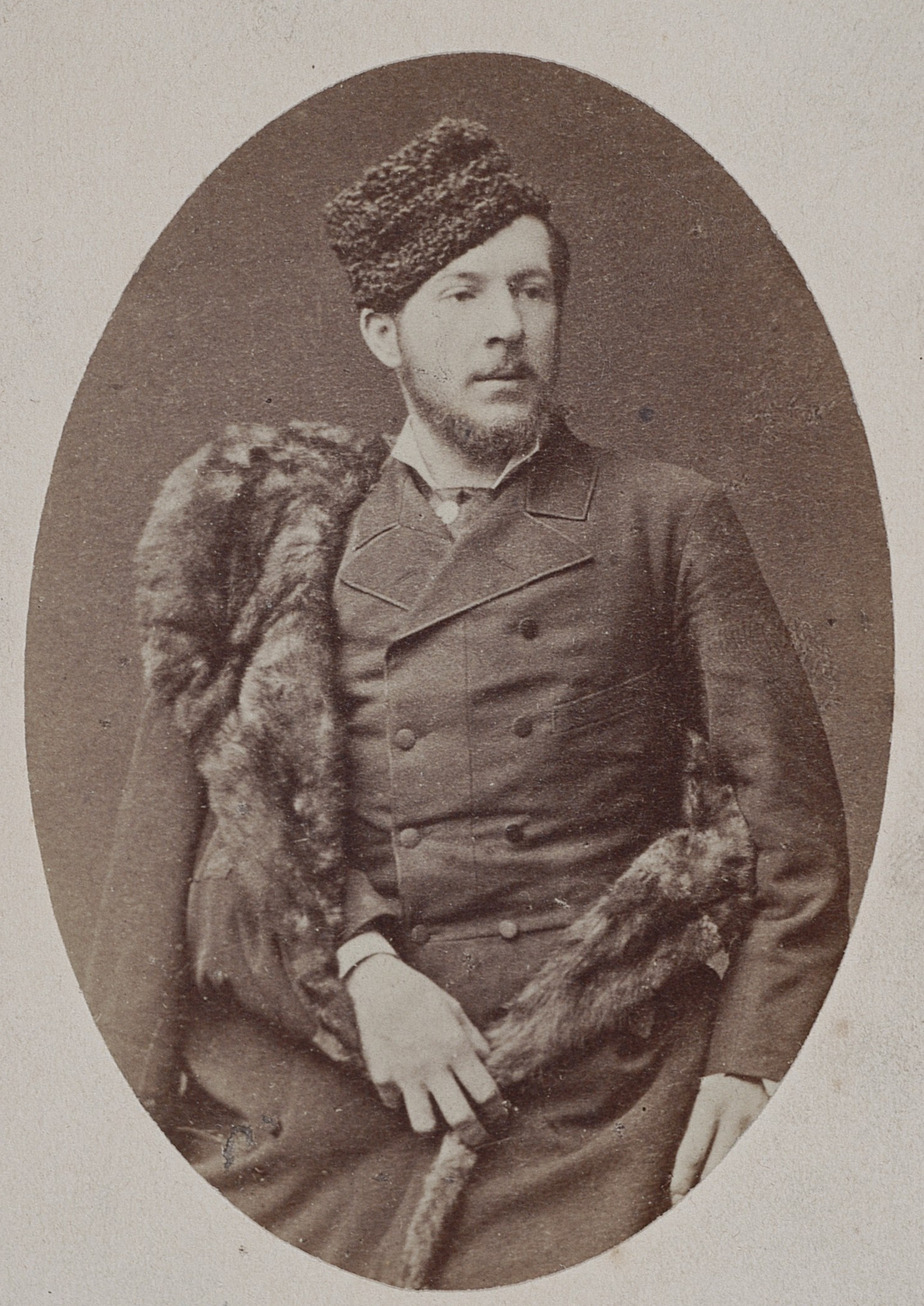 Tadeusz Ajdukiewicz, 1882 r.